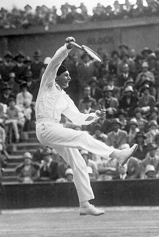 Der "fliegende Baske" kommt nach Berlin! Jean Borotra, der berühmte französische Tennismeister, auch "der fliegende Baske" genannnt, wird am 10. und 11. Januar in der neuen Tennishalle in Berlin dem Publikum sein grosses Können zeigen.